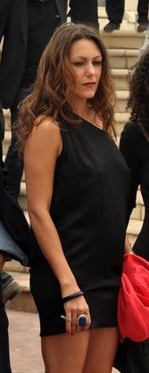 Karole Rocher lors de la présentation du film "Polisse" au festival de Cannes 2011